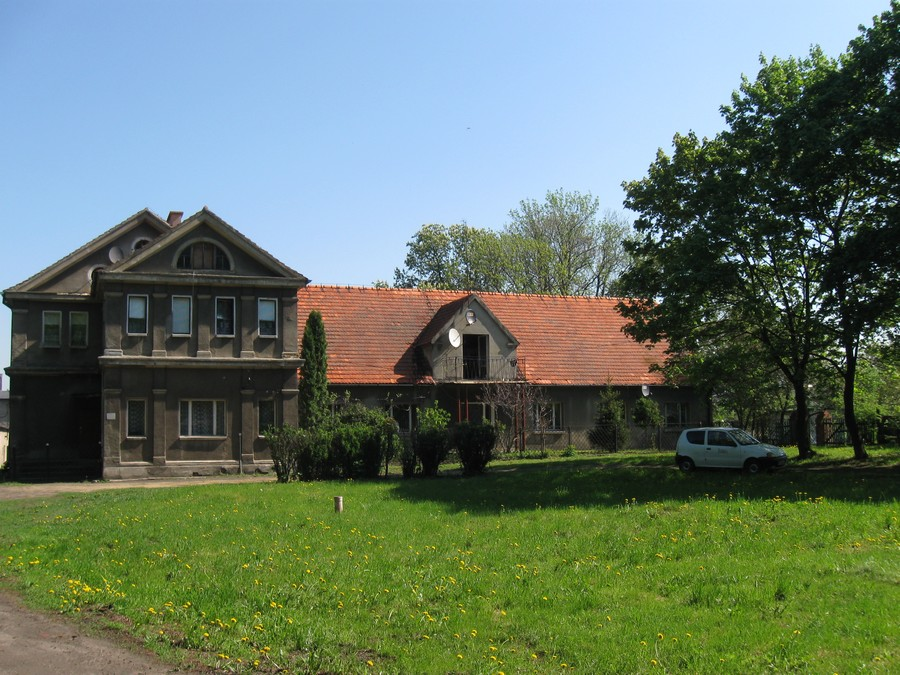 Jaraczewo - zespół dworski z XIX w.: dwór, park (zabytek nr 1616/A)